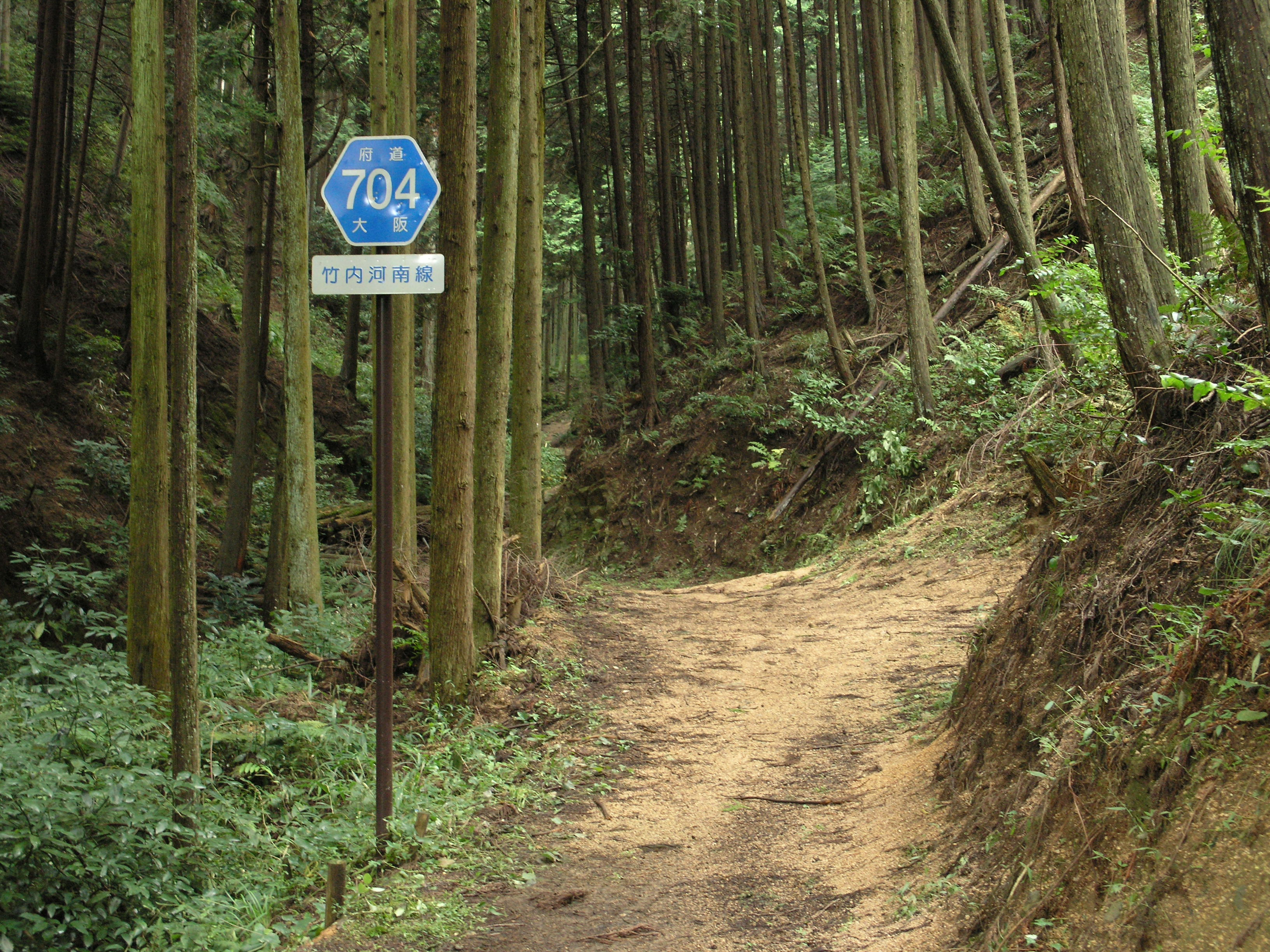 大阪府道704号竹内河南線 (大阪府河南町平石) 2008年9月撮影。 機材：C8080WZ 撮影者：Kansai explorer